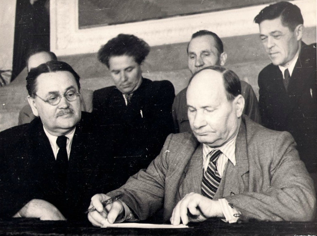 Я. Колас і дырэктар Батанічнага інстытуту АН БССР Васіль Купрэвіч падпісваюць Стакгольмскі заклік